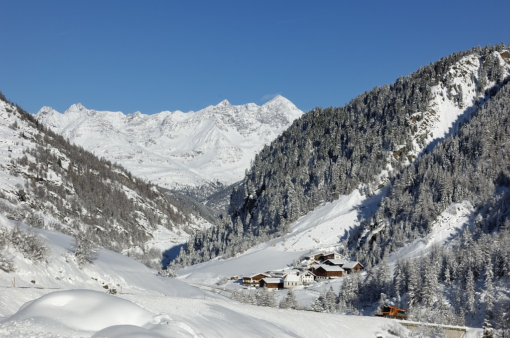 Venter Tal